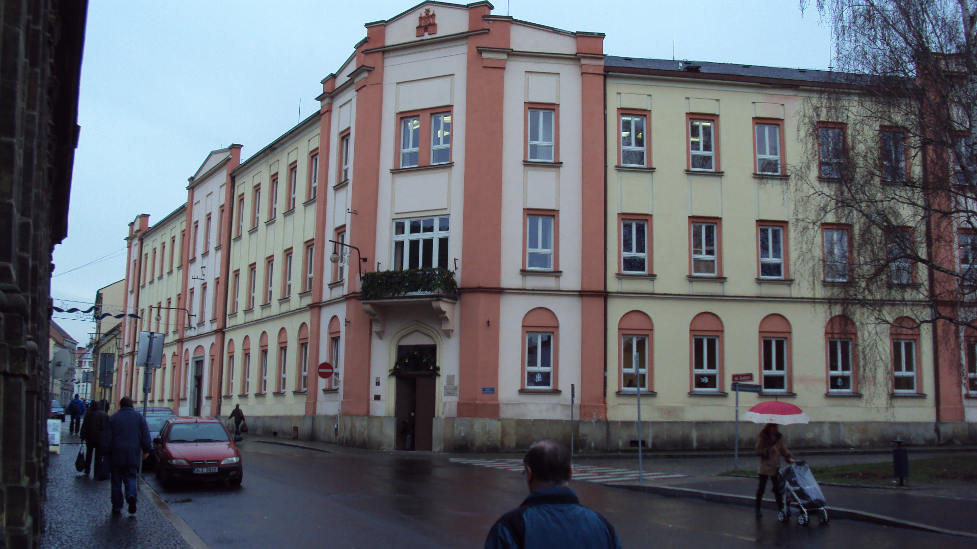 Budova Obchodní akademie na náměstí Osvobození v České Lípě